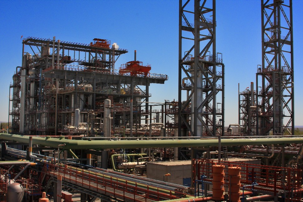 ESTRUCTURA